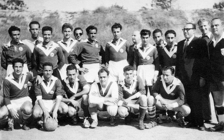 Équipe vainqueur du 2ème championnat de Tunisie